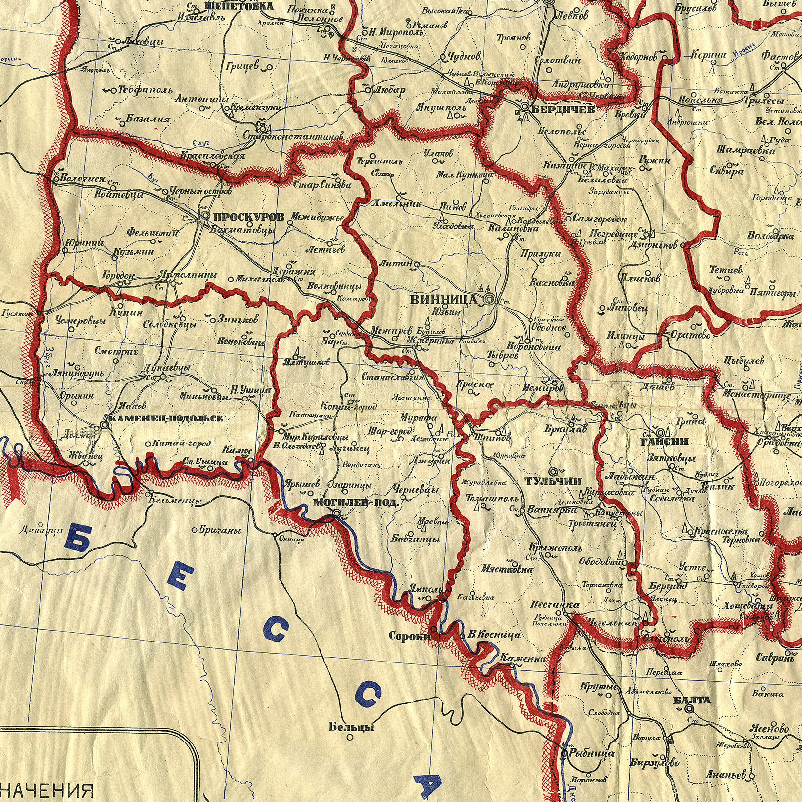 Подільська губернія, фрагмент мапи Української соц. рад. республіки, адміністративний поділ після 12 квітня 1923 року